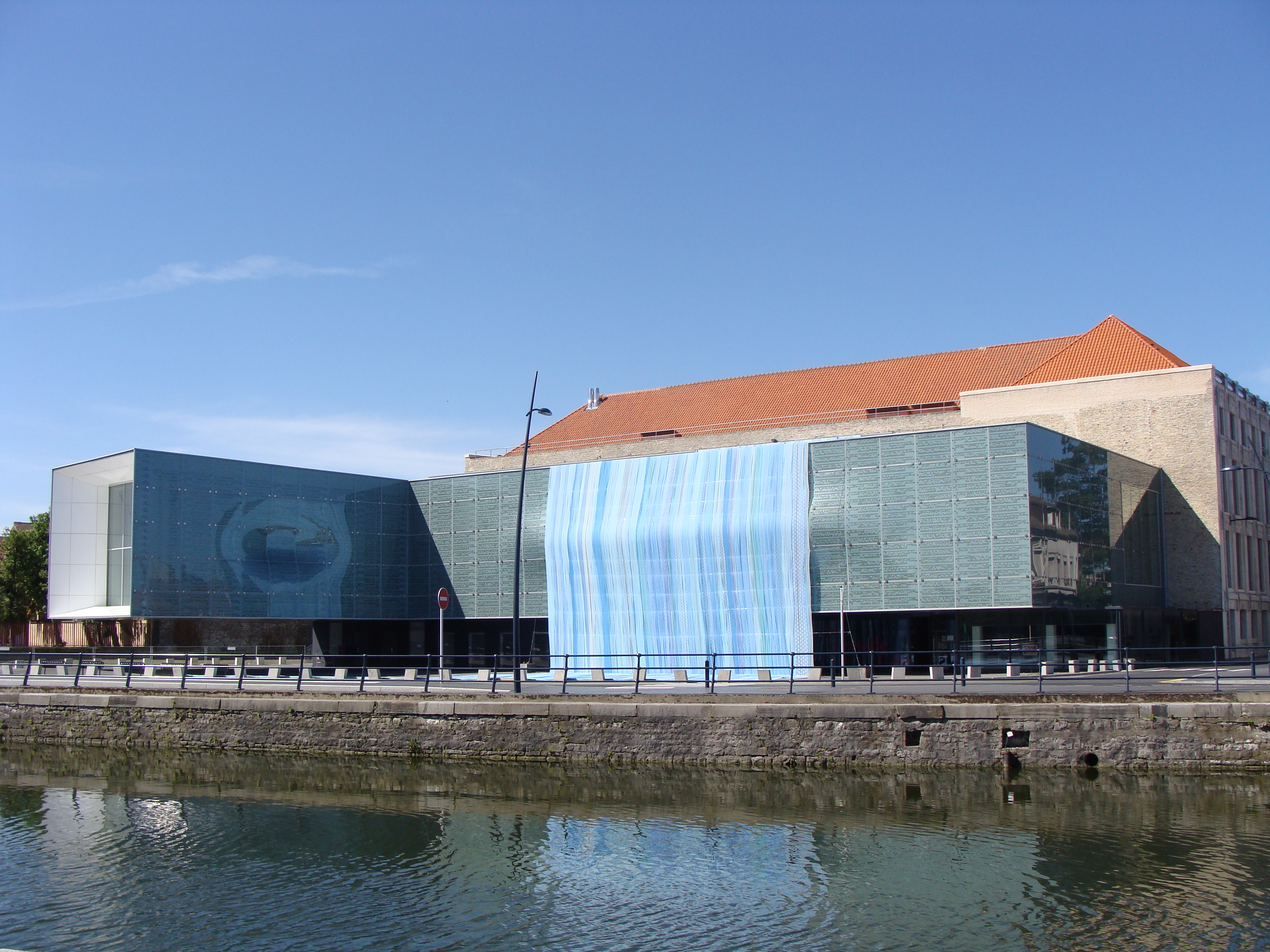 Cité internationale de la dentelle et de la mode de Calais - quai de la gendarmerie